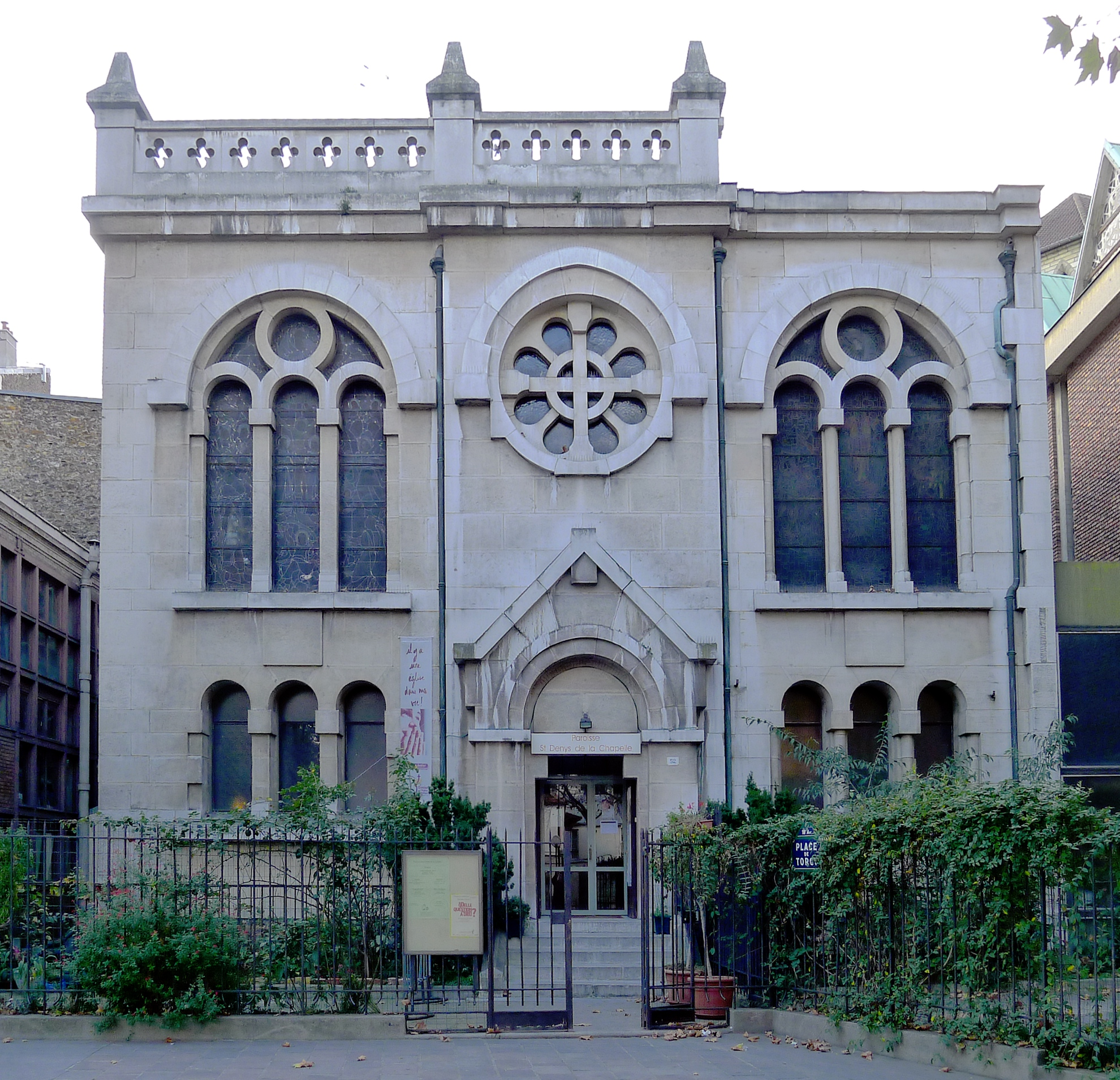 Eglise Saint-Denys-de-la-Chapelle - Paris XVIII